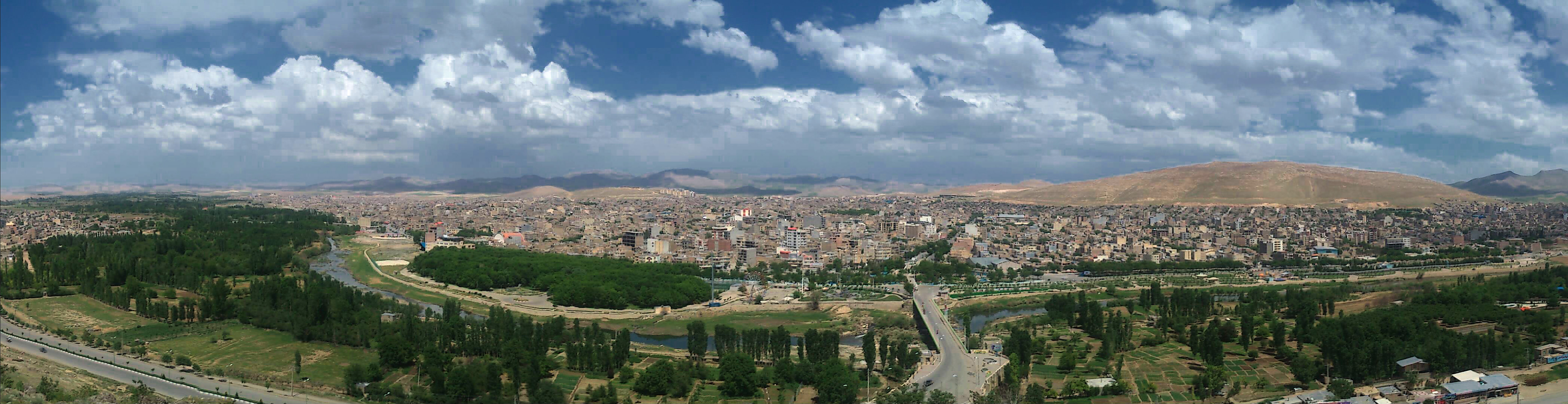 سراسرنمای شهر بوکان